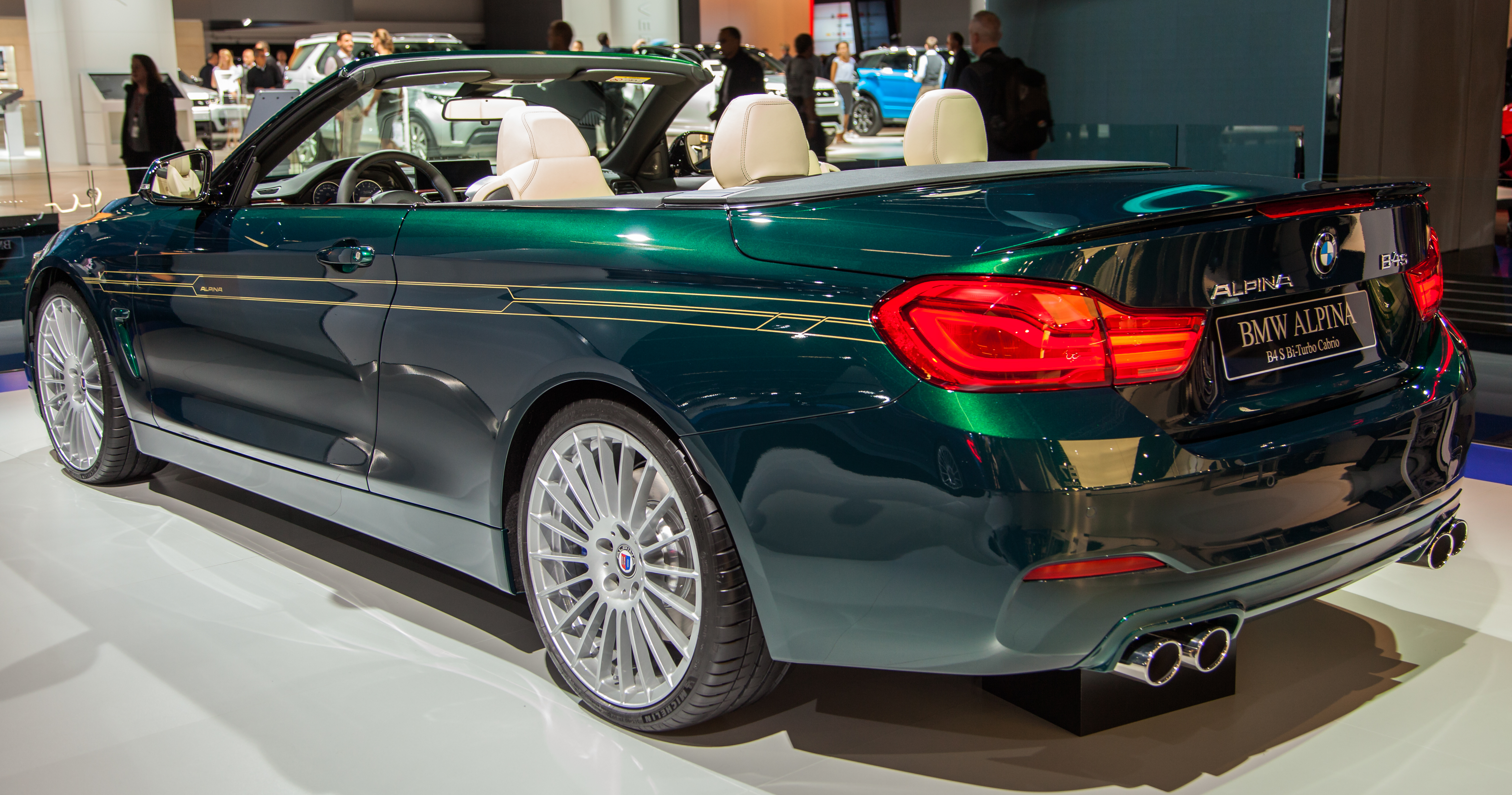 Alpina B4 S Bi-Turbo Cabrio